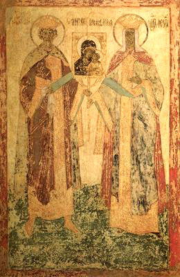 Empress Theodora (9th century) and emperor Michael. Fresco in Blagoveshenskiy Temple of Moscow Kremlin. Император Михаил и царица Феодора. Фреска Благовещенского собора Московского Кремля. Середина XVI в.